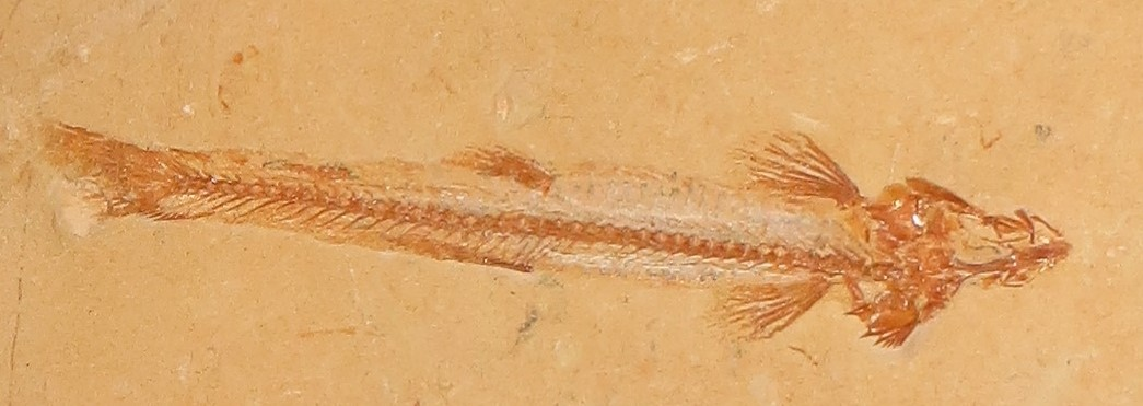 Fossil of Charitopsis- Took the picture at Museo Scienze Naturali di Faenza